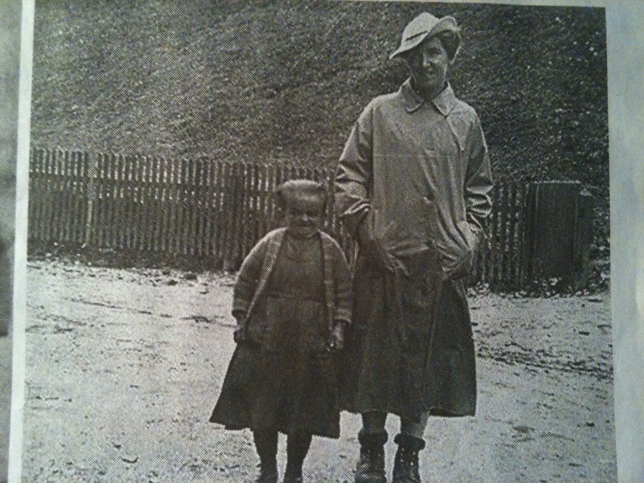 Einer der Samnauner Kleinwüchsigen